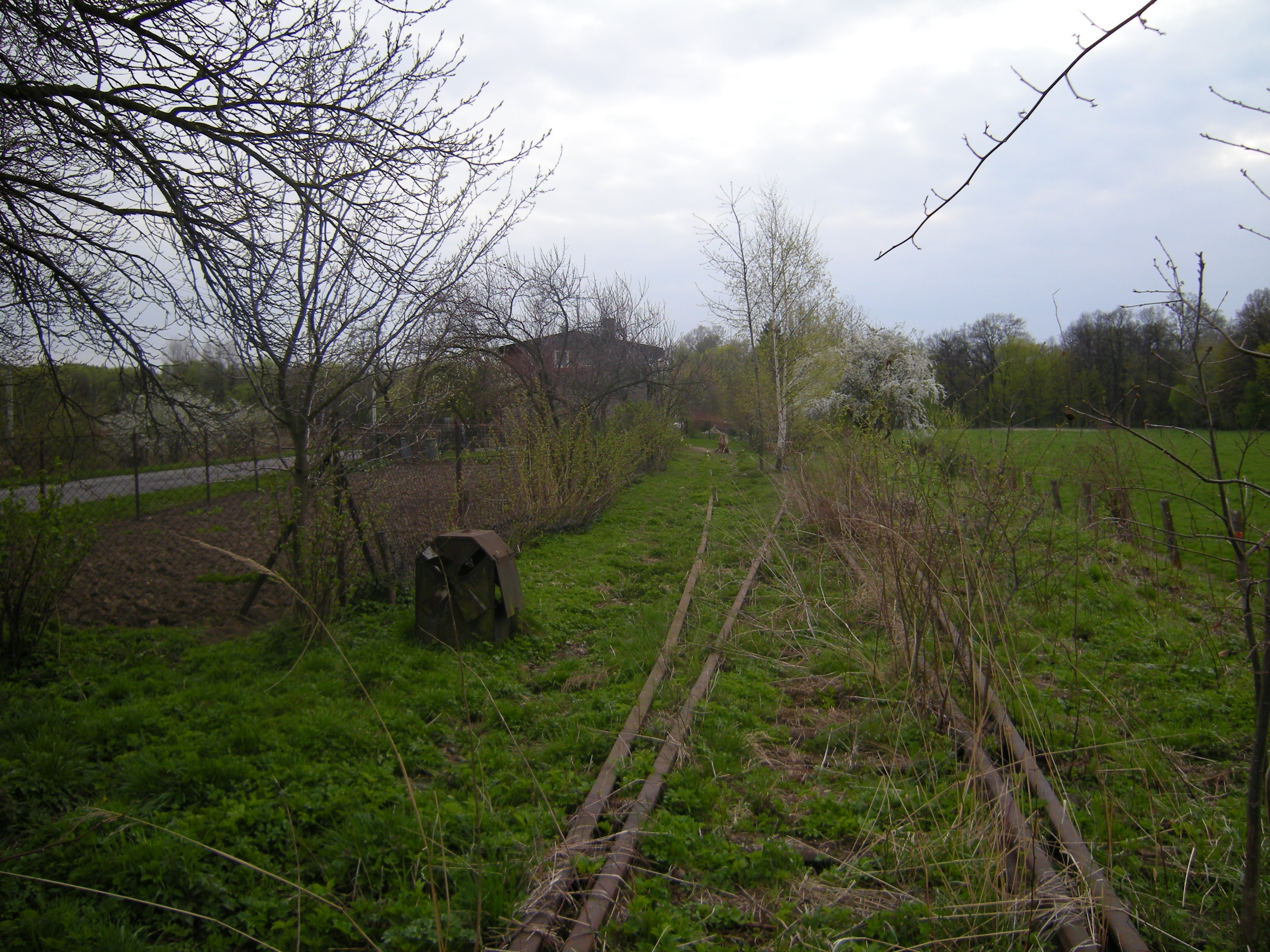 Były przystanek kolejowy w Białej Nysce